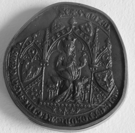 Eliška Přemyslovna